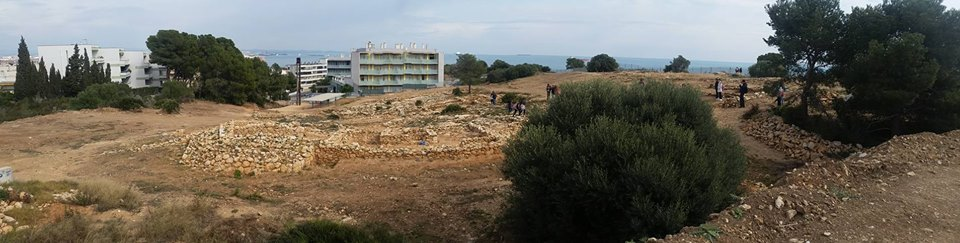 Ara l'explicarem